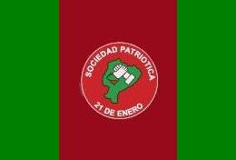 Logo del Partido Sociedad Patriótica 21 de Enero.